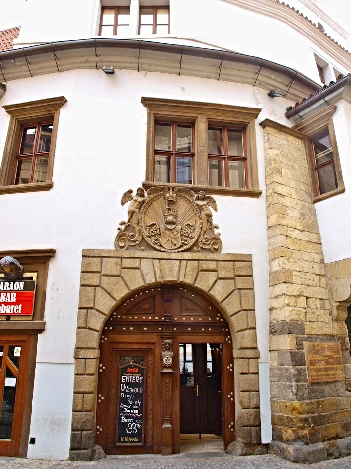 dům u Vejvodů